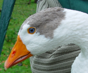 zelf gemaakt